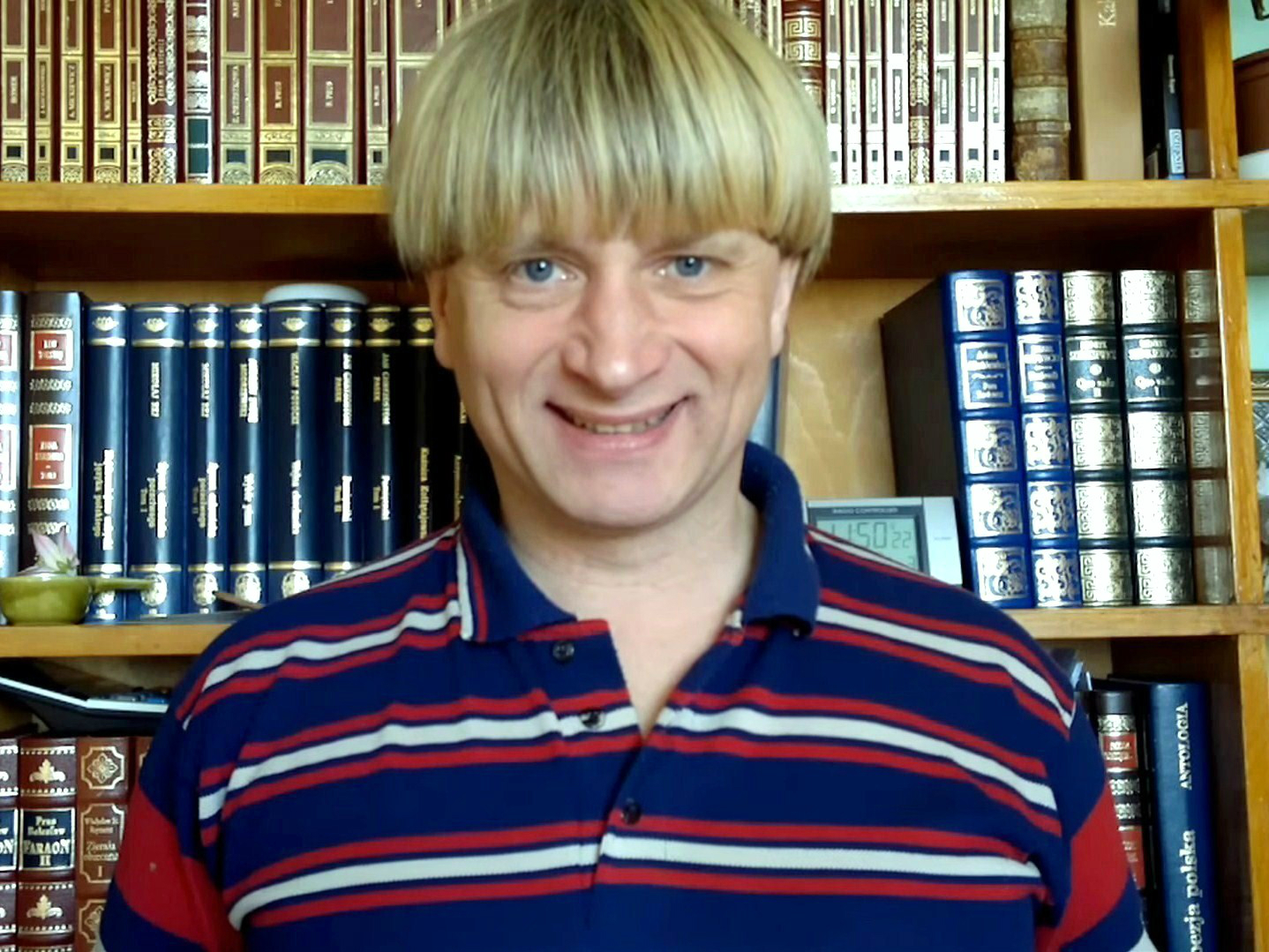 Gracjan Roztocki, polska osobliwość medialna, z zawodu cukiernik.